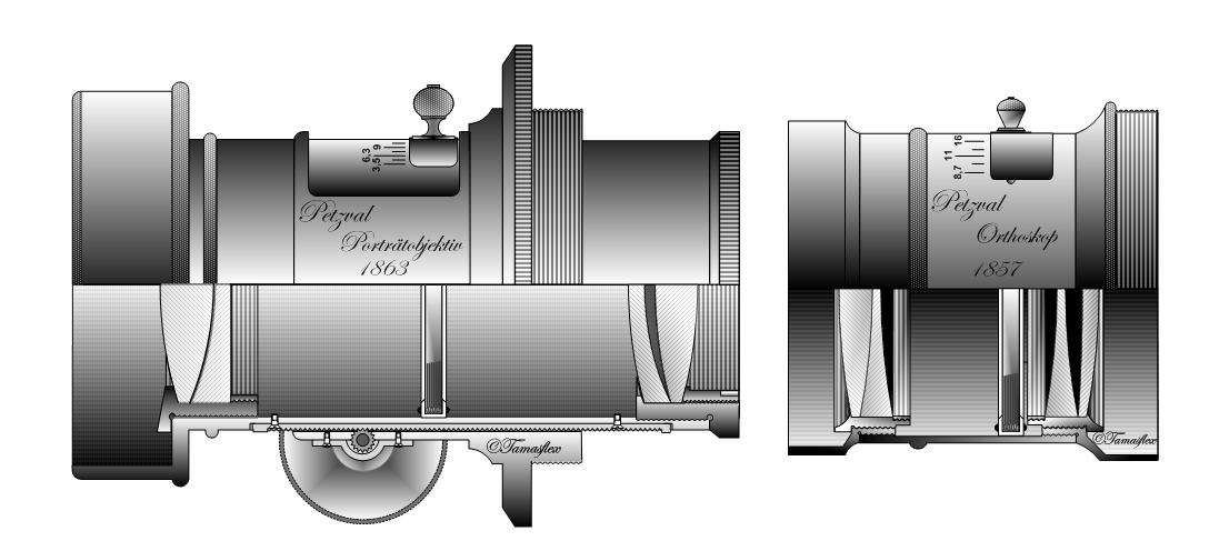 Petzval lens.